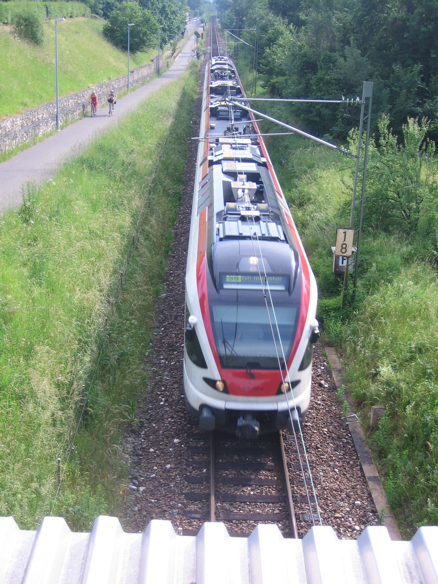 Ein Stadler-FLIRT von oben.